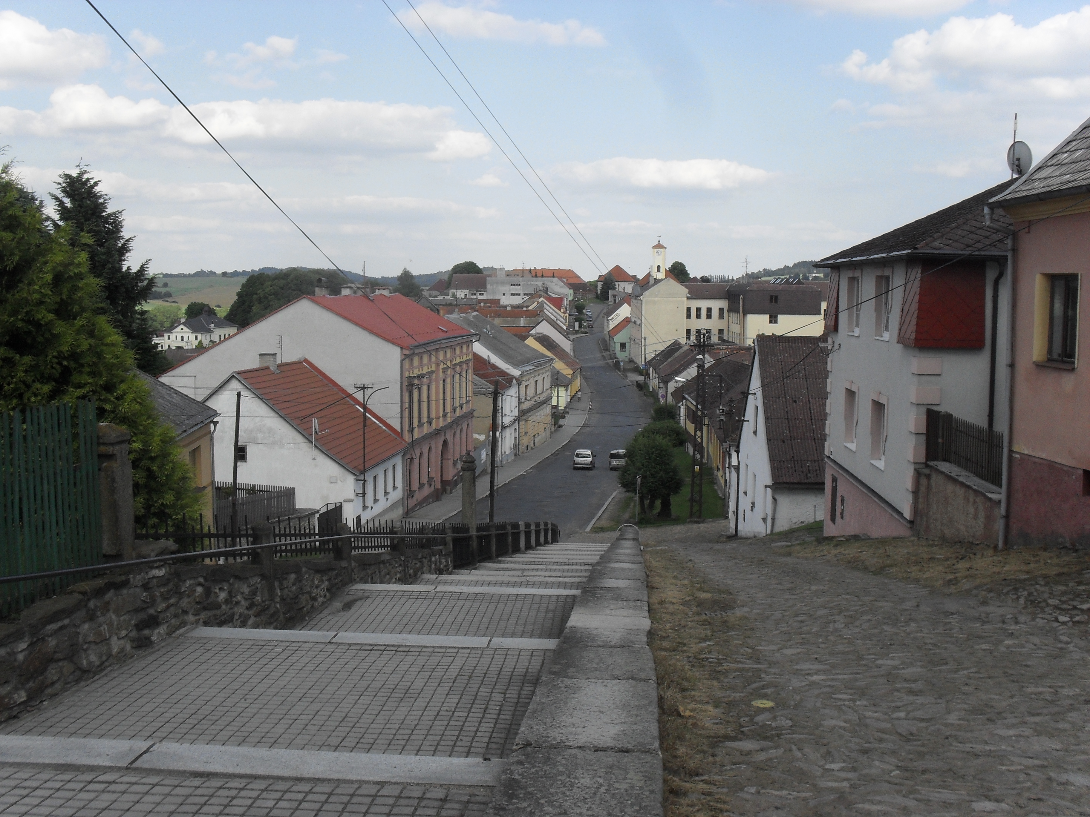 Plánice, rodiště Františka Křižíka ( nachází v okrese se Klatovy v Plzeňském kraji ).